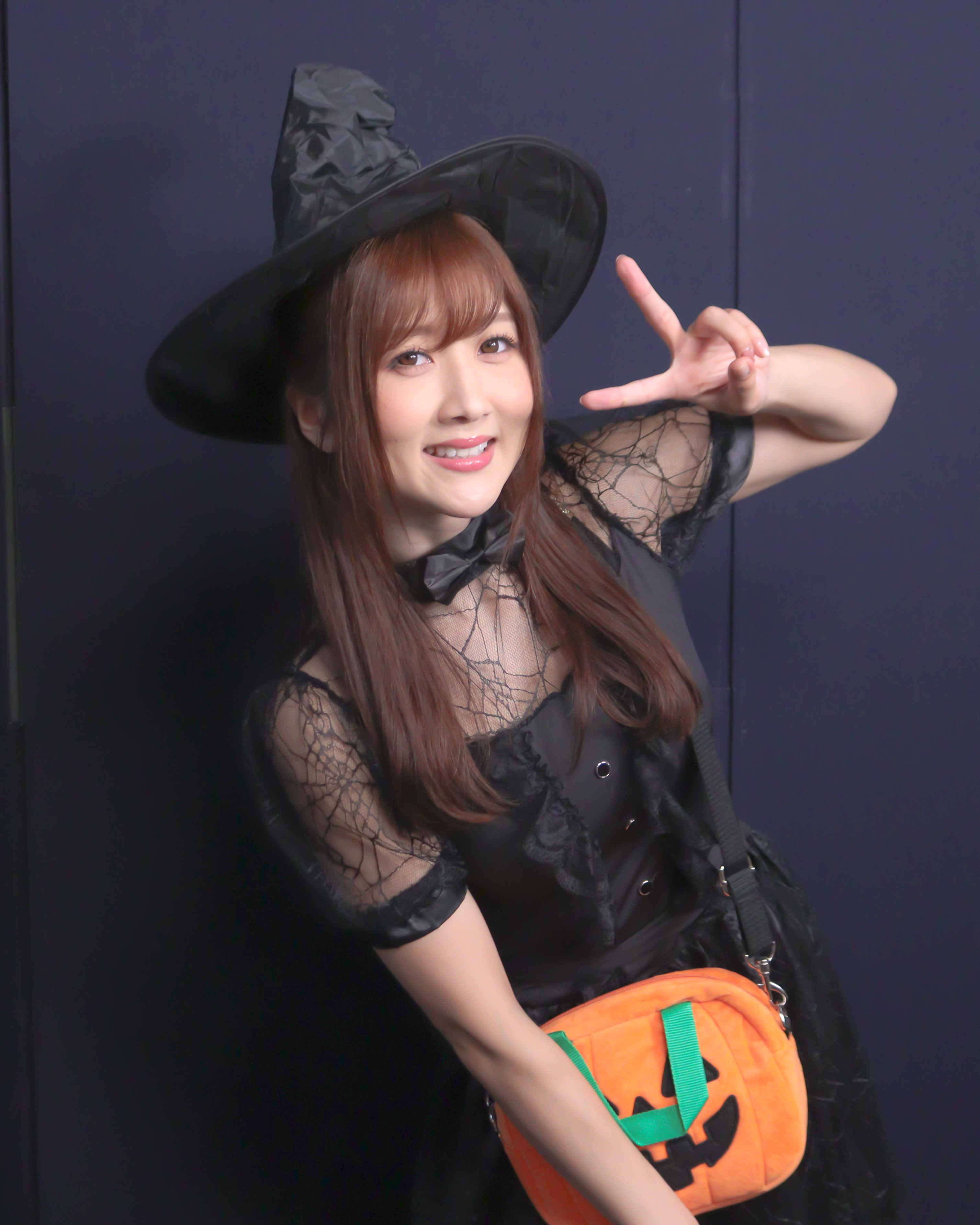 大槻ひびき19年10月オフ会時の写真